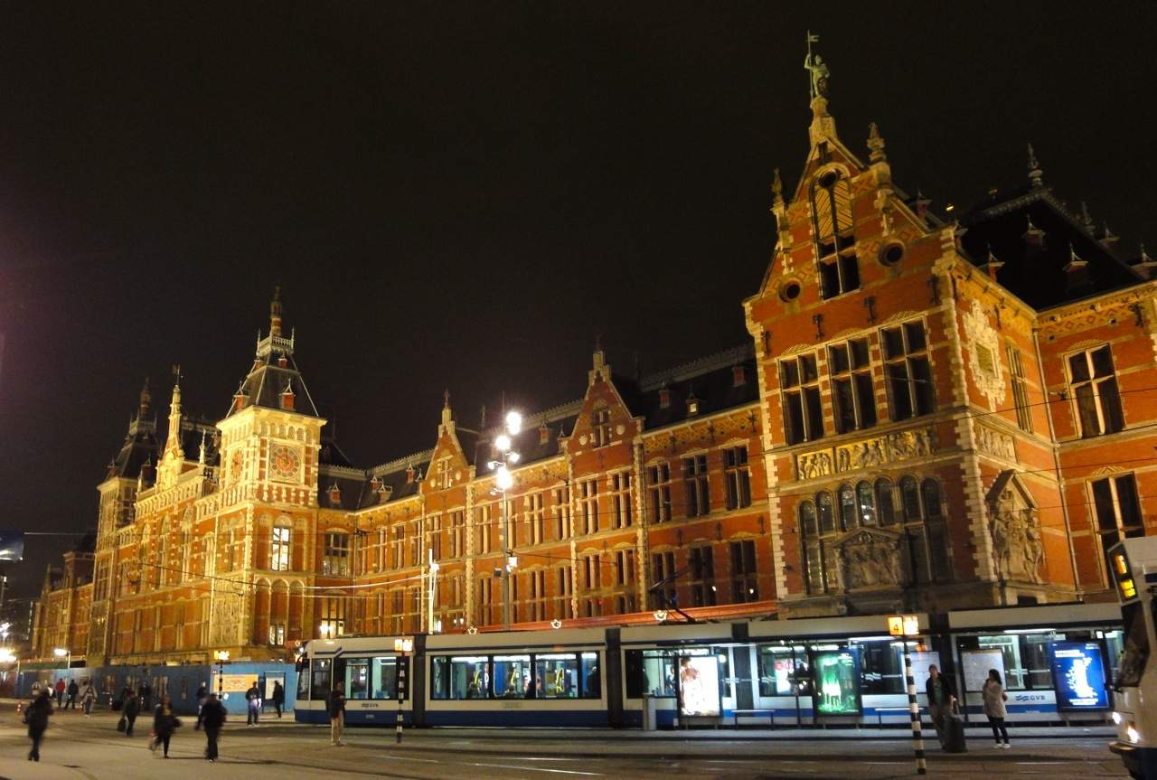 Centraal Station (P.J.H. Cuypers / A.L. van Gendt, 1881 - 1889) aan het Stationsplein te Amsterdam bij nacht.